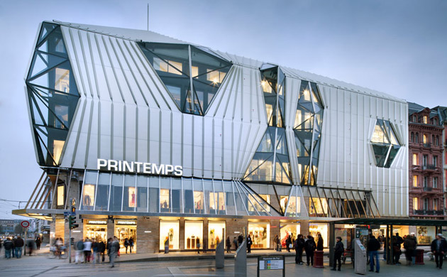 Façade extérieur du magasin Printemps à Strasbourg